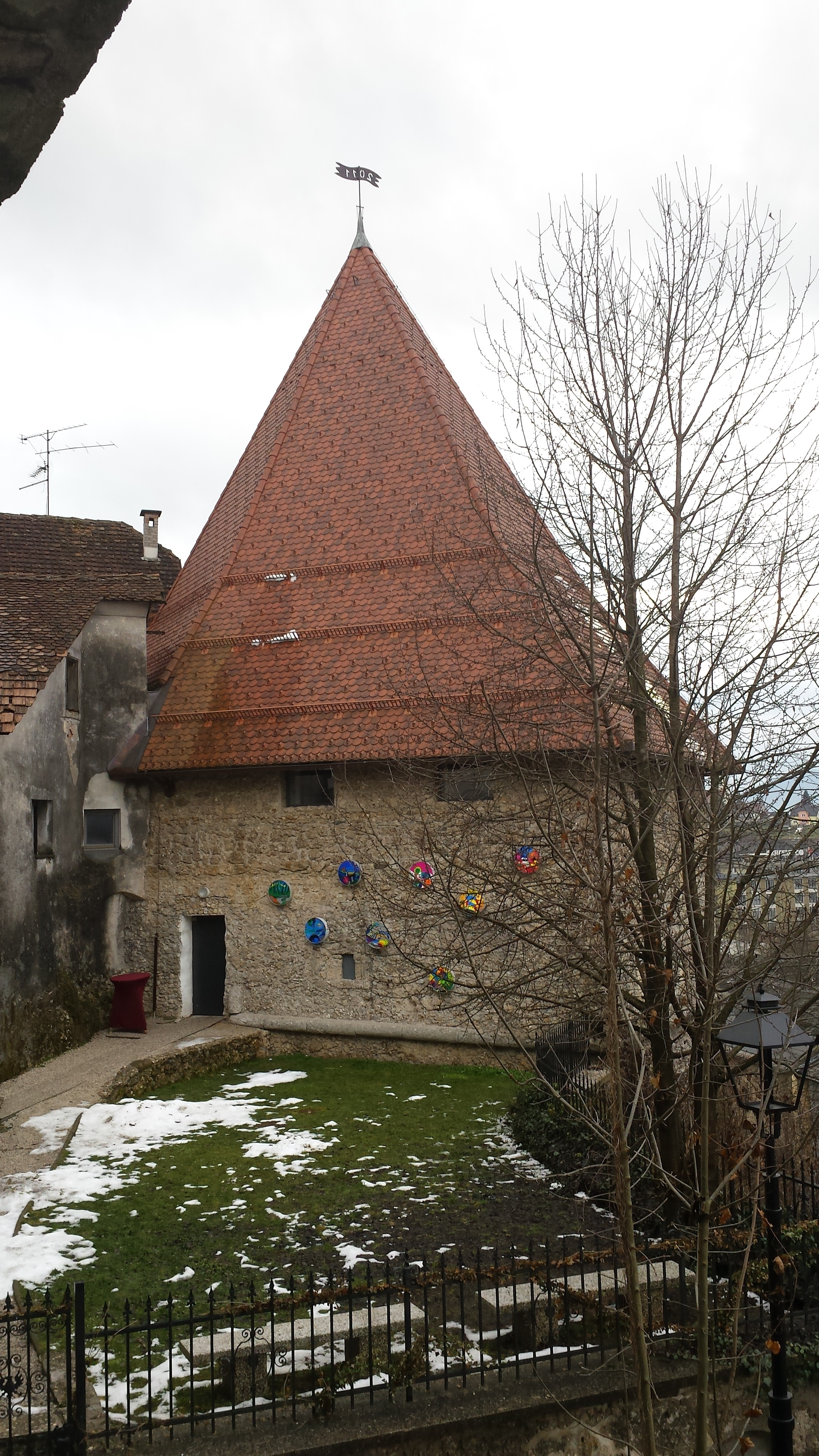 Obrambni stolp Škrlovc. Kranj. Avtor: M. Mravlja